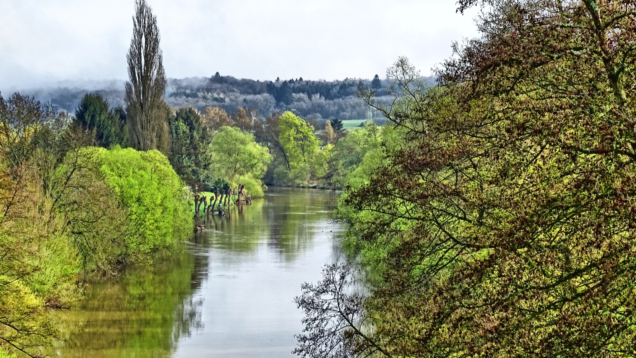 Blick auf die Lahn bei Lollar (Landkreis Gießen, Deutschland) vom Lahnwanderweg aus.